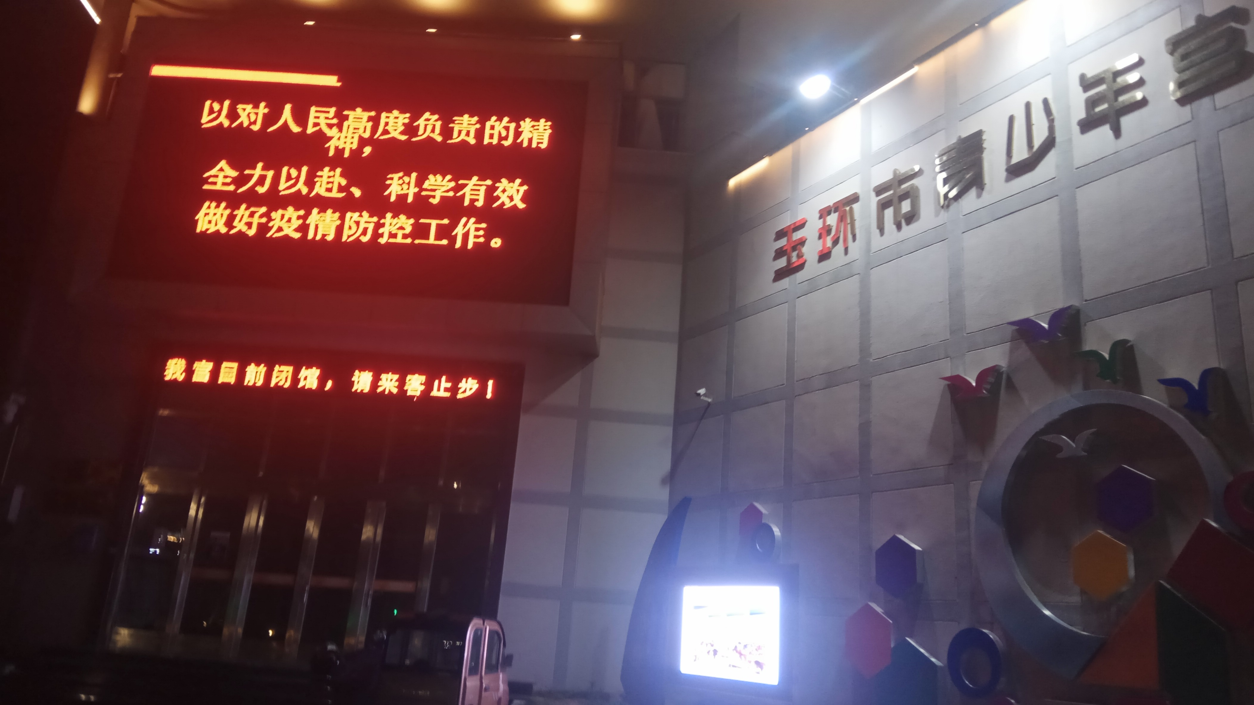 中文（中国大陆）: 玉环市青少年宫在新冠肺炎疫情暴发期间闭馆